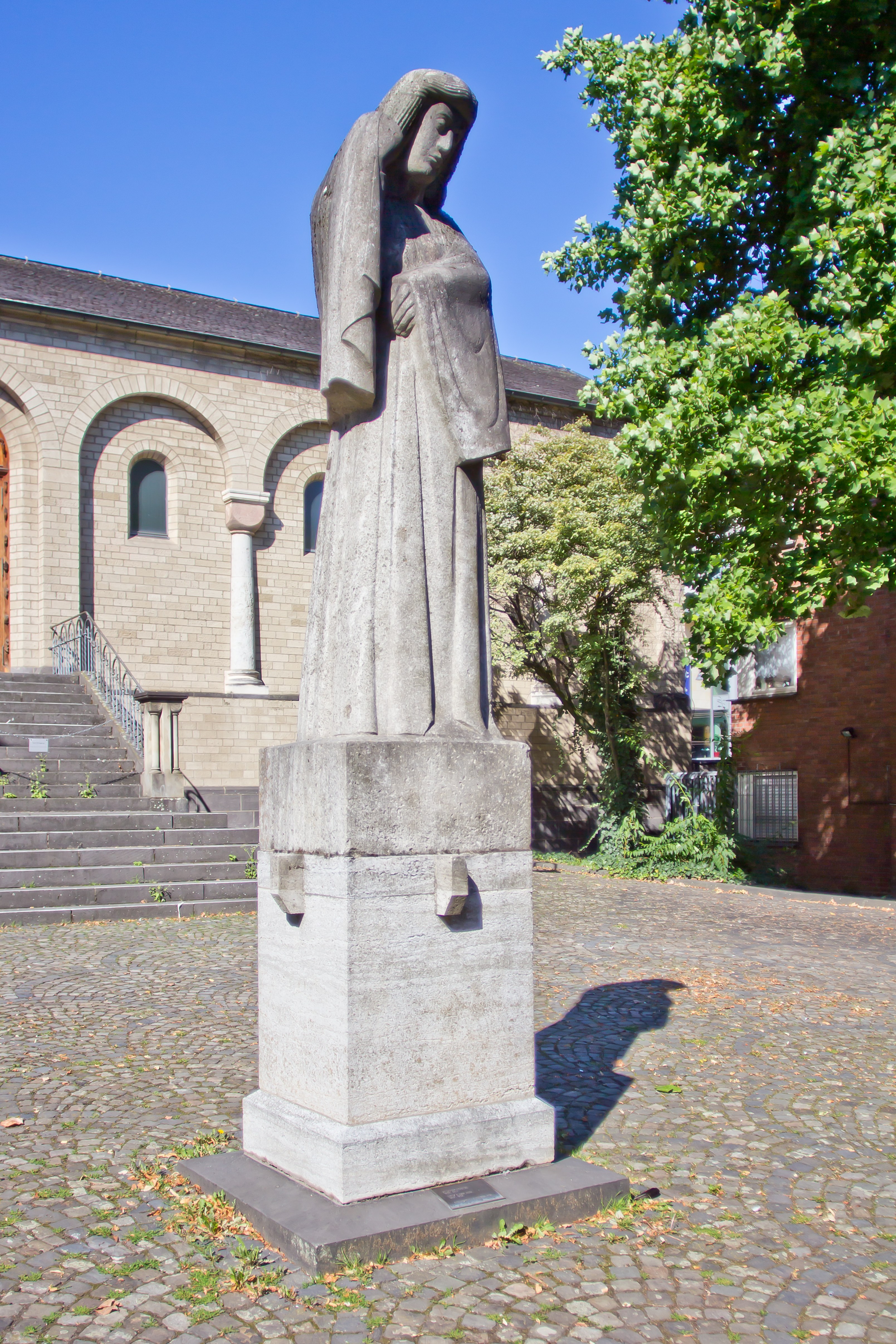 Kölner Mahnmal - Trauernde - Lichhof, vor St. Maria im KapitolThis is a photograph of an architectural monument.